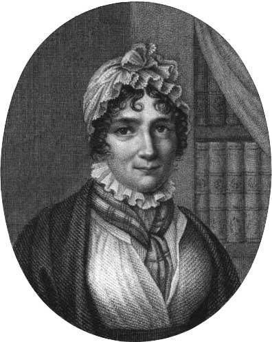 Portrait d'Isabelle de Montolieu (1751-1832) - frontispice du livre Caroline de Lichtfield, par madame de *** [É.J.P. Polier de Bottens] publ. par le traducteur de Werther [G. Deyverdun]. Par mme de Montolieu - Paris : Arthus Bertrans librairie 1821